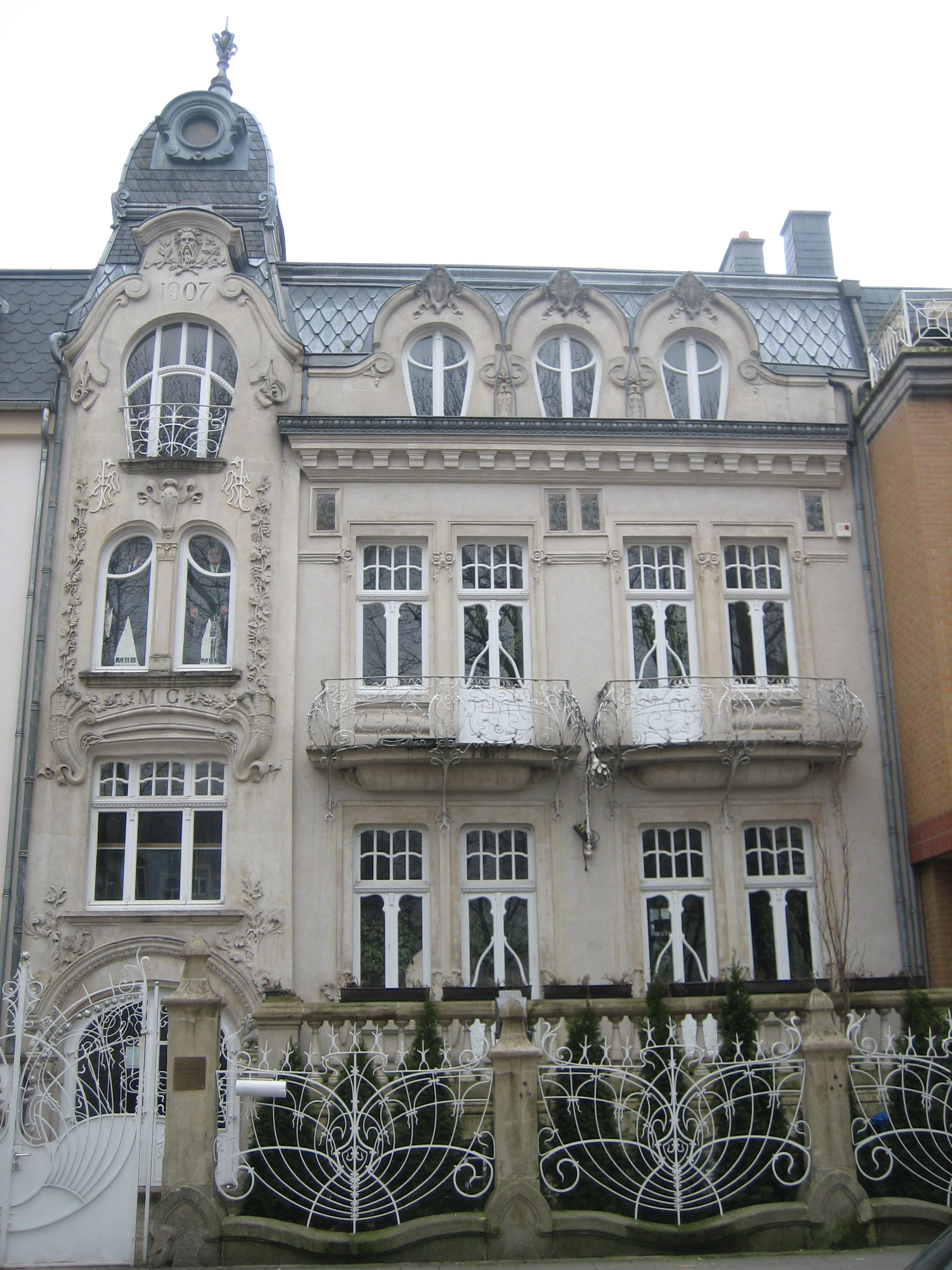 Sujet: D'sou genanntent Meder-Haus an der Zenon-Bernard-Strooss zu Esch-Uelzecht; zënter dem 12. Dezember 1973 op der Lëscht vum Inventaire supplémentaire vun de klasséierte Monumenter. Auteur vun der Foto: Zinneke, Februar 2011